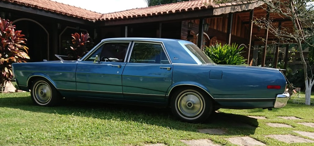 O último Landau a deixar a linha de produção da Ford no Ipiranga em SP. Um pedido especial de cor e de teto sem vinil e com vidro traseiro grande.